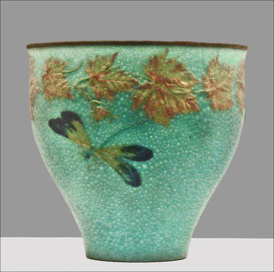 Vase "libellule et feuilles de vigne vers 1900 Albert-Louis Dammouse (1848-1926) Pâte de verre acquis en 1927 Article Wikipedia sur A-L; Dammouse Petit Palais Musée des Beaux-arts de la ville de Paris